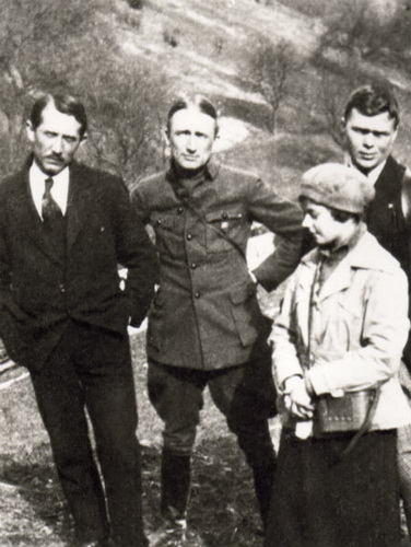 Полковники Євген Коновалець та Андрій Мельник на еміграції. фото 1920-х років